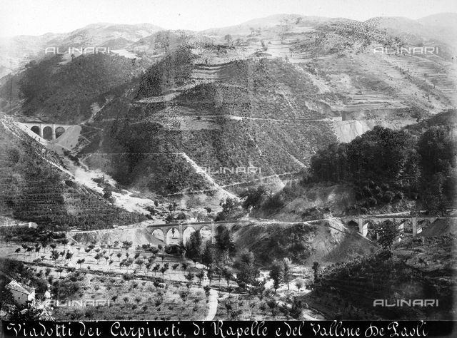 Veduta dei viadotti dei Carpineti, di Rapelle e del Vallone dei Paoli, nel comune di Antrodoco (RI), lungo la ferrovia Terni-Rieti-L'Aquila.